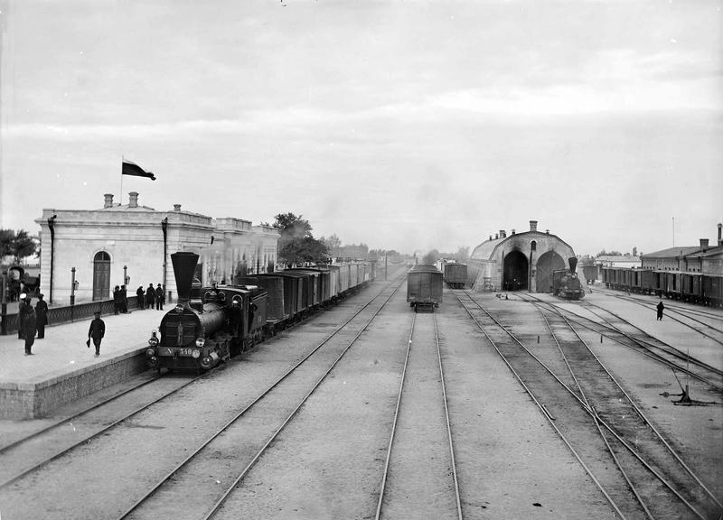 Из Стамбула в Ташкент: Фотопленки Поля Надара (1890). Часть 12. Самарканд